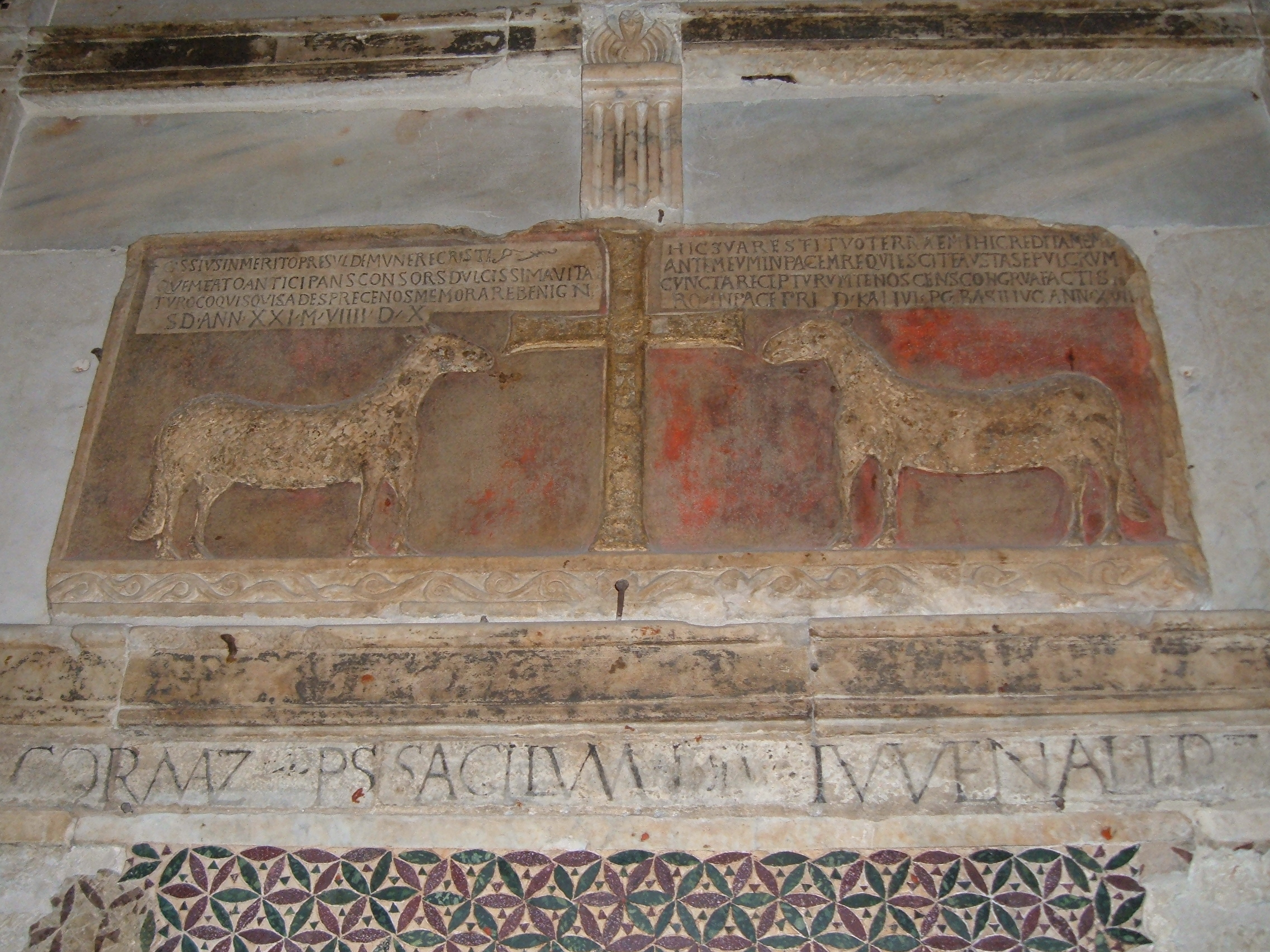 Chiesa di San Giovenale, a Narni. Interno: bassorilievi cromatici.